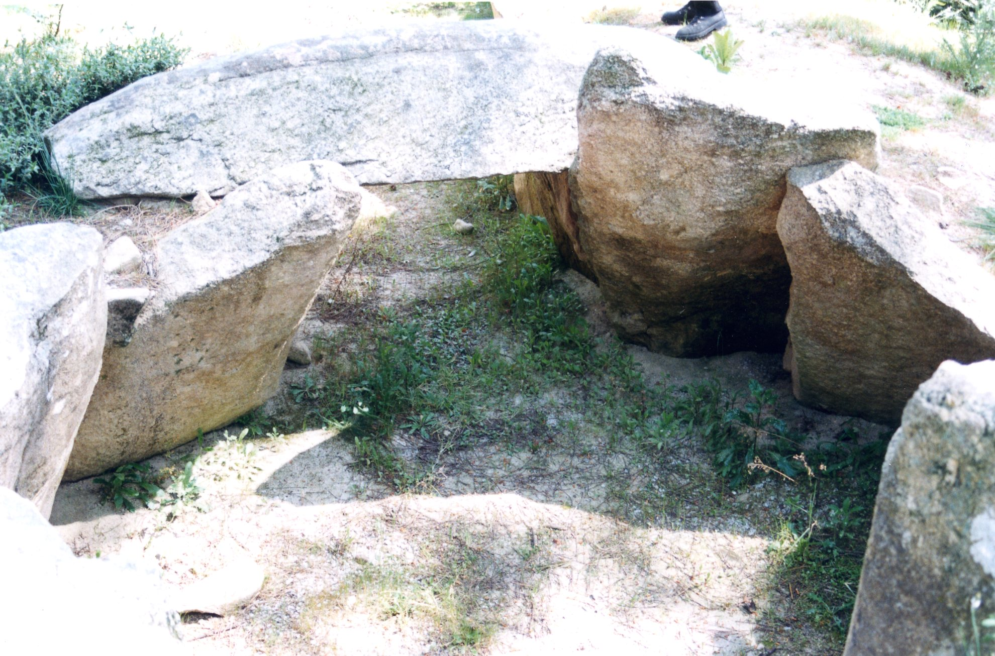 Anta do Pinheiro dos Abraços This file was uploaded for Wiki Loves Monuments in Portugal with the unique identifier 73334.